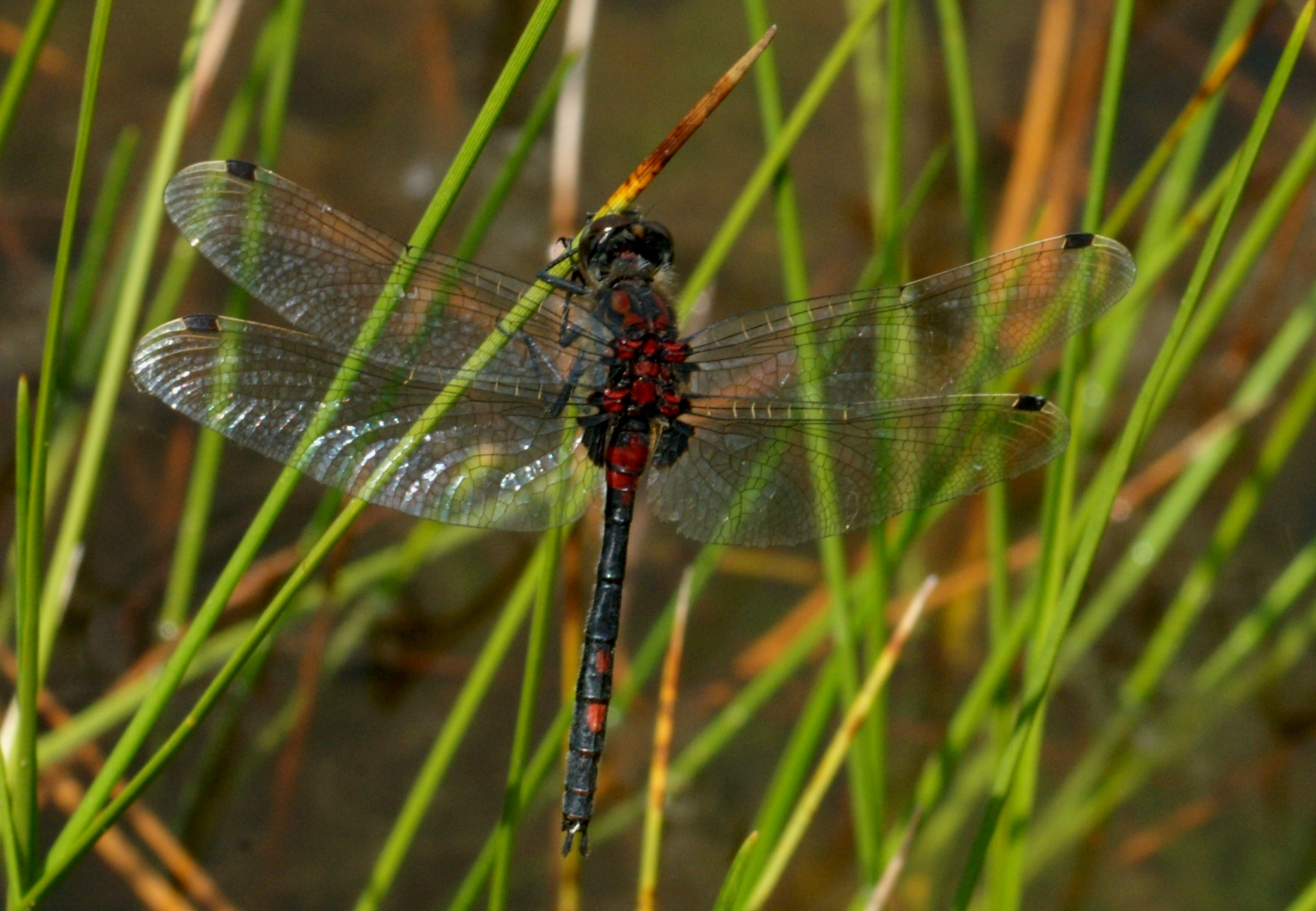 Kleine Moosjungfer, Leucorrhinia dubia, männlich/male